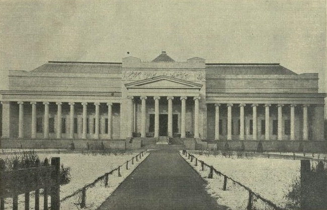 Московский Музей Изящных Искусств имени императора Александра III в 1912 году.